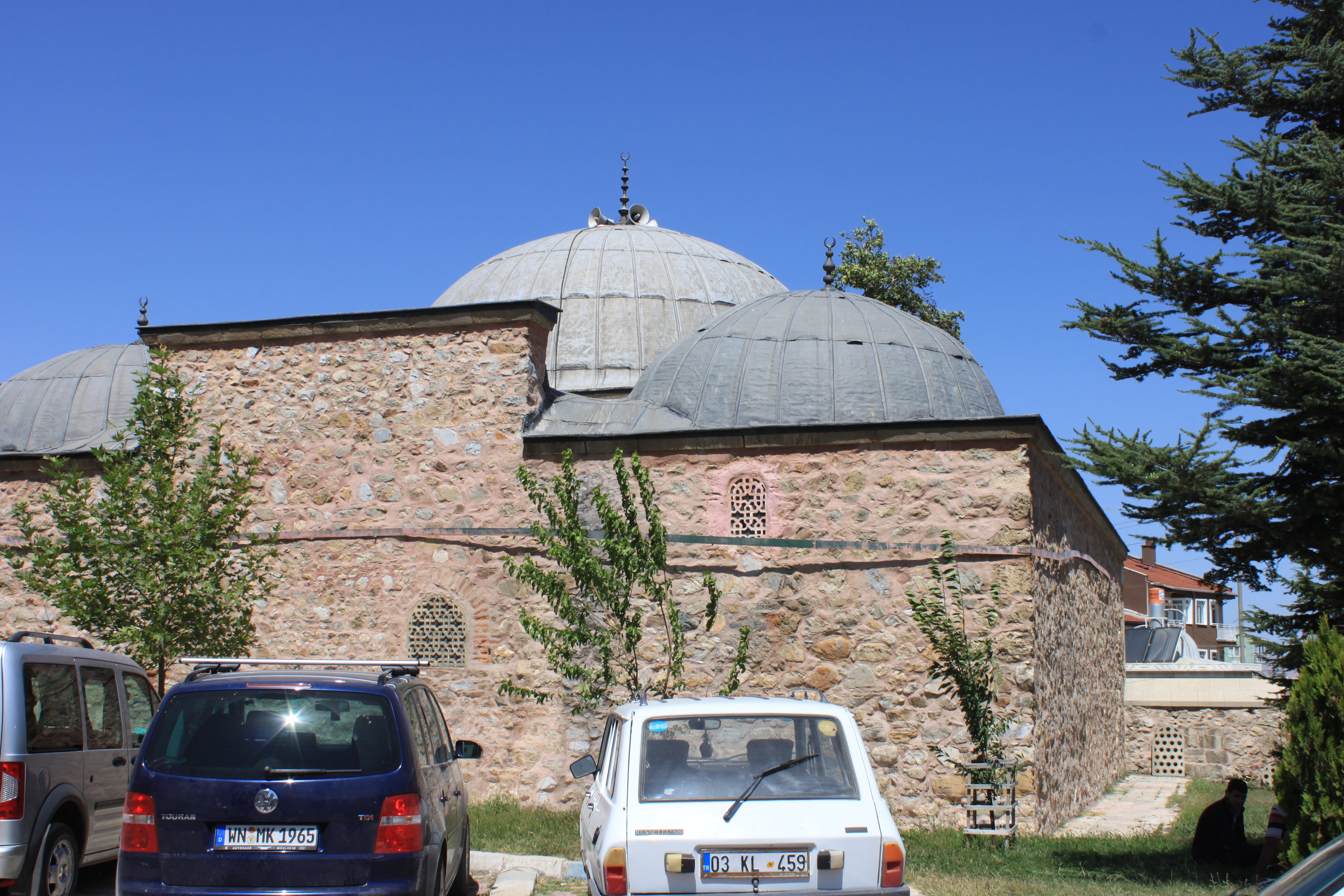 Blick auf die ehemalige Taş Medresein Çay von Westen.